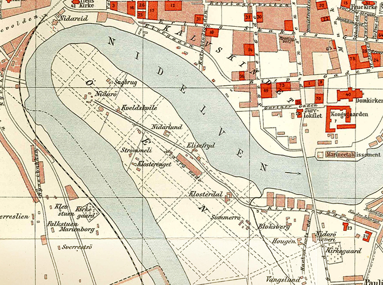 Kart over Øya, Trondheim, 1898